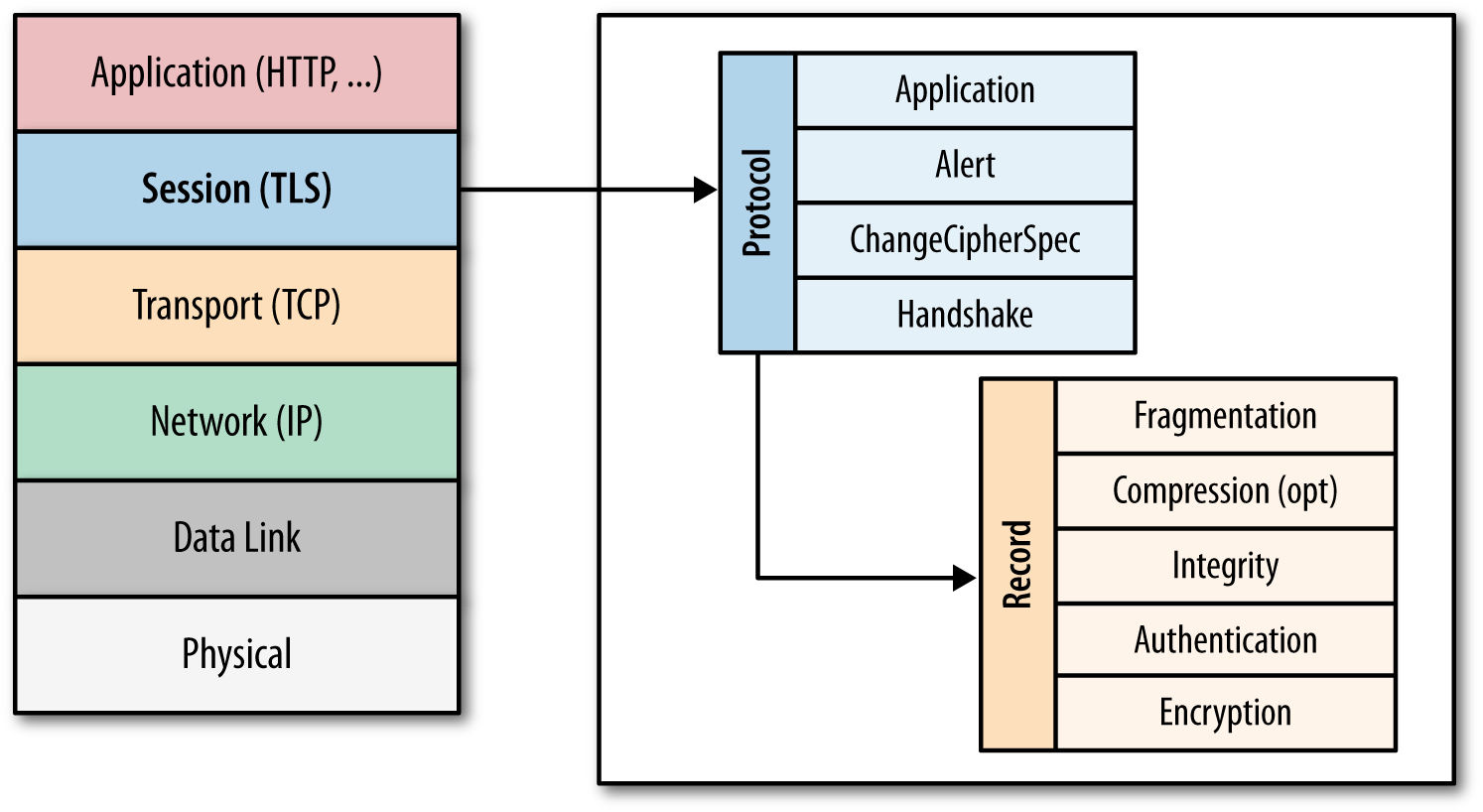 struktura e tls-it